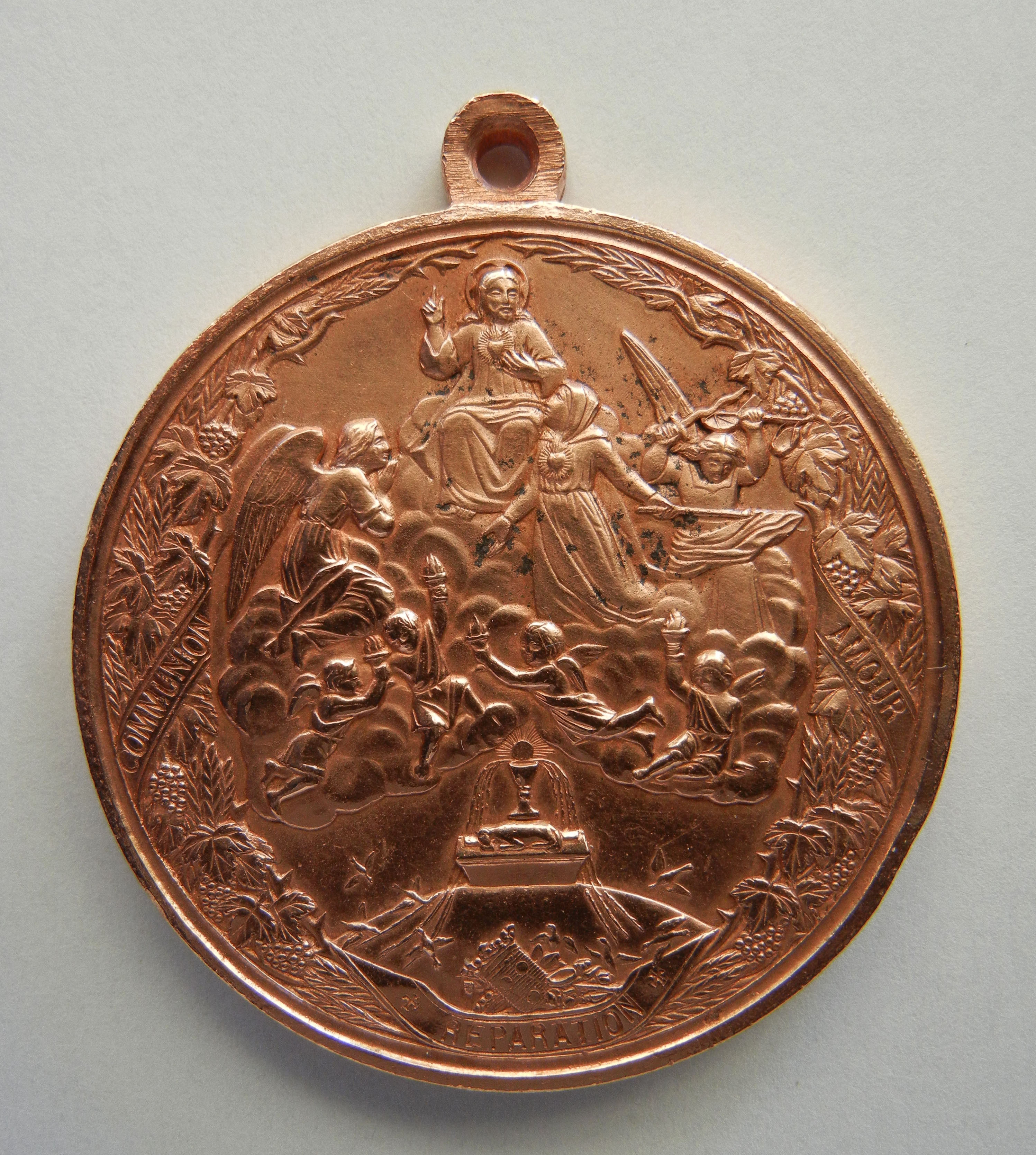 Médaille (avers) éditée le 13 mai 1862 lorsque Pie IX déclara "Bienheureuse" Marguerite-Marie ALACOQUE (1647 – 1690) Inhumée au monastère de Paray-le-Monial. Elle fut Canonisée en 1920. Graveur : Ludovic PENIN à Lyon (1830 - 1868). Médaille en cuivre. Diamètre : 40 mm. Poids : 30 grs